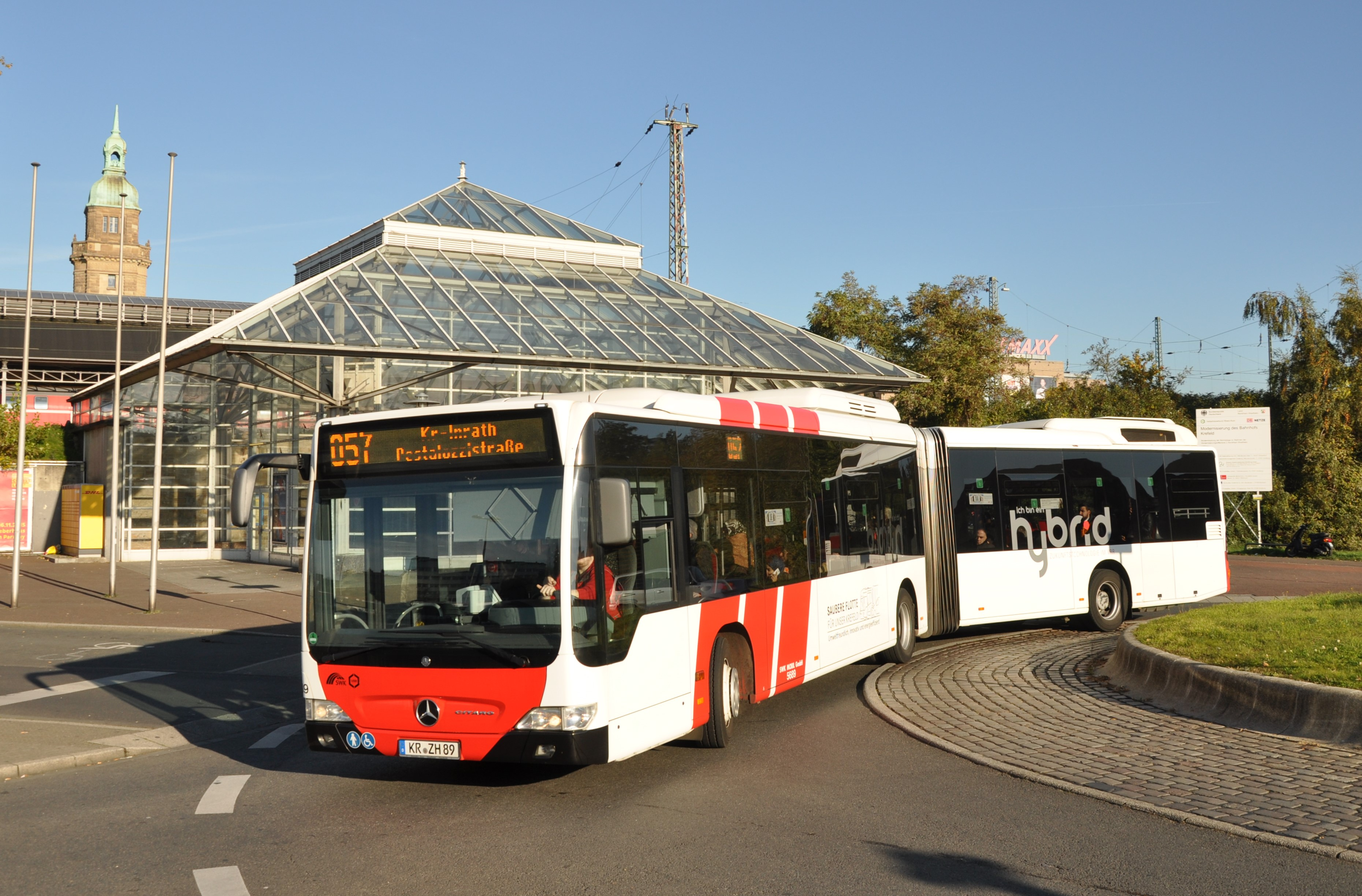 Stadtbus der SWK Mobil vor dem Krefelder Hauptbahnhof